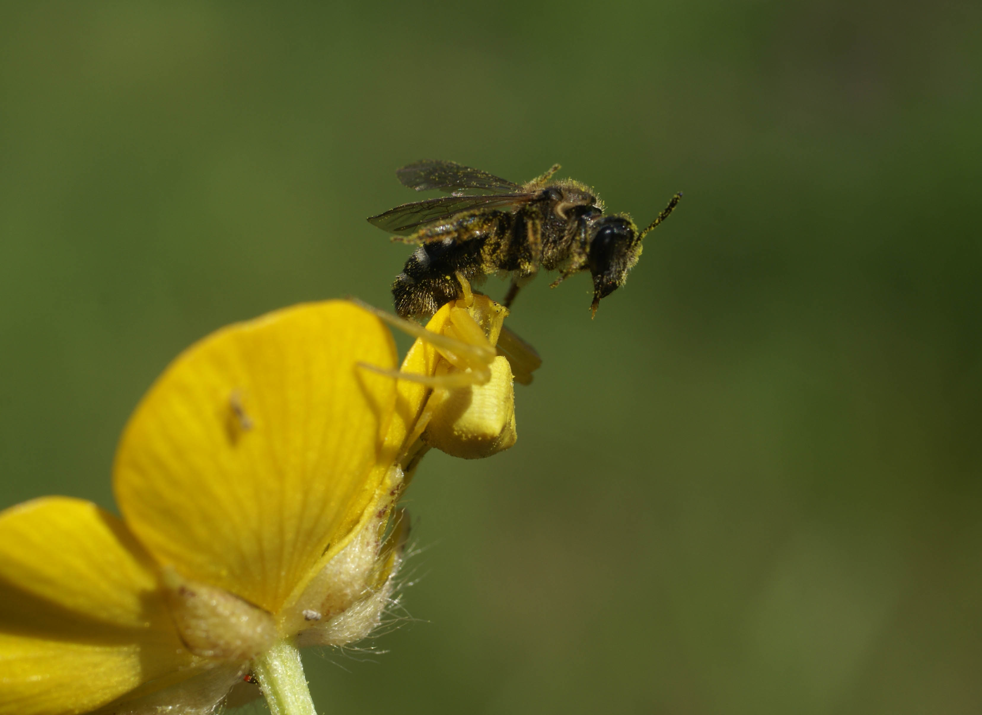 Misumena vatia armiarma bat erle bat harrapatuta.